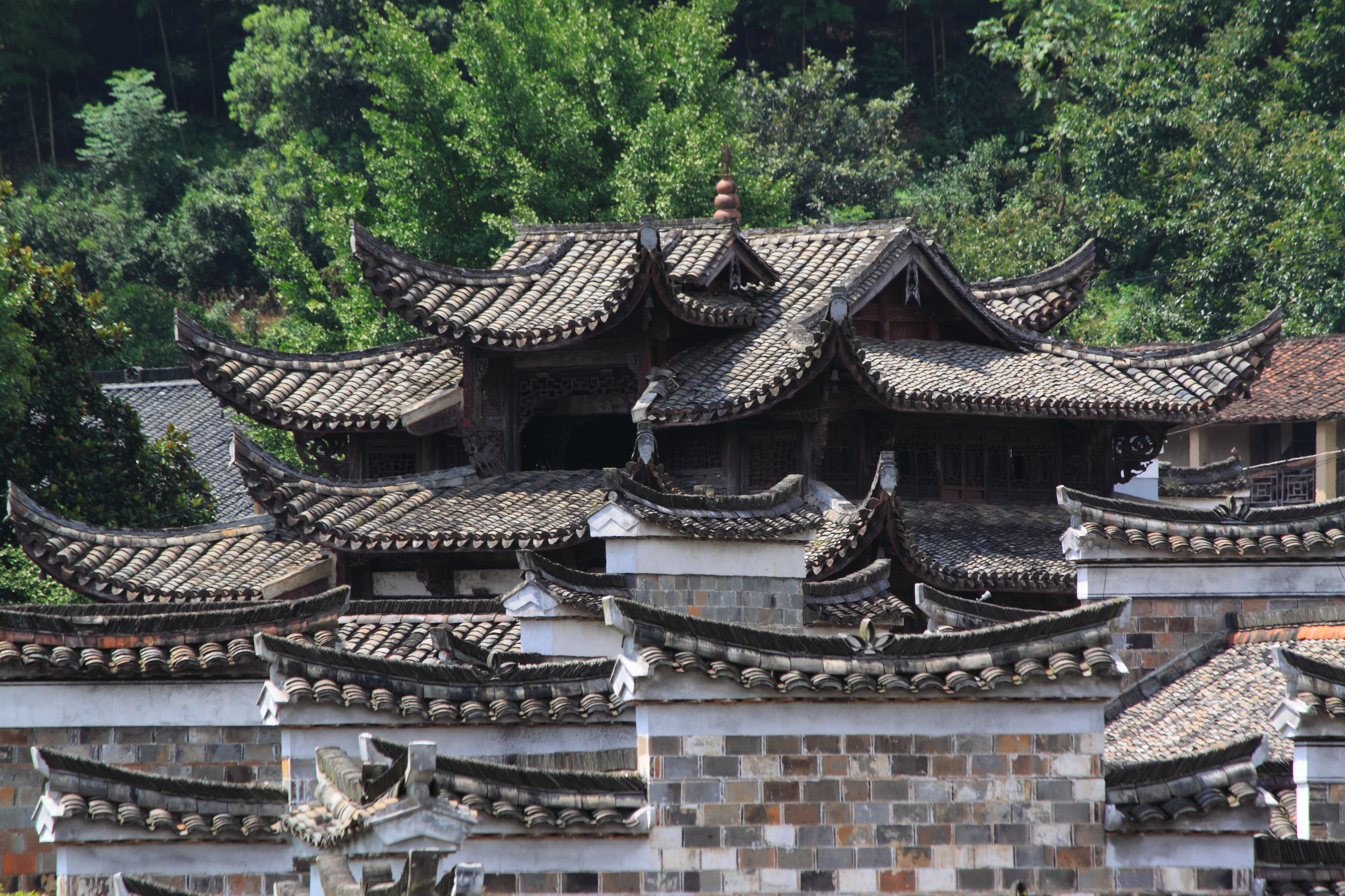 廿八都镇文昌阁，位于中国浙江省江山市。